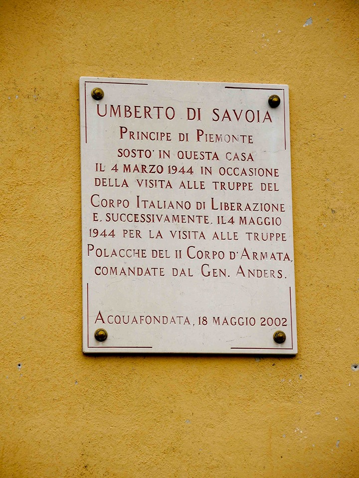 Il principe Umberto sosta in paese, nel corso degli eventi bellici del 1944.